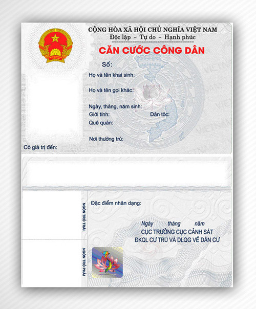 Mặt trước và mặt sau của Thẻ Căn cước Công dân (Việt Nam)